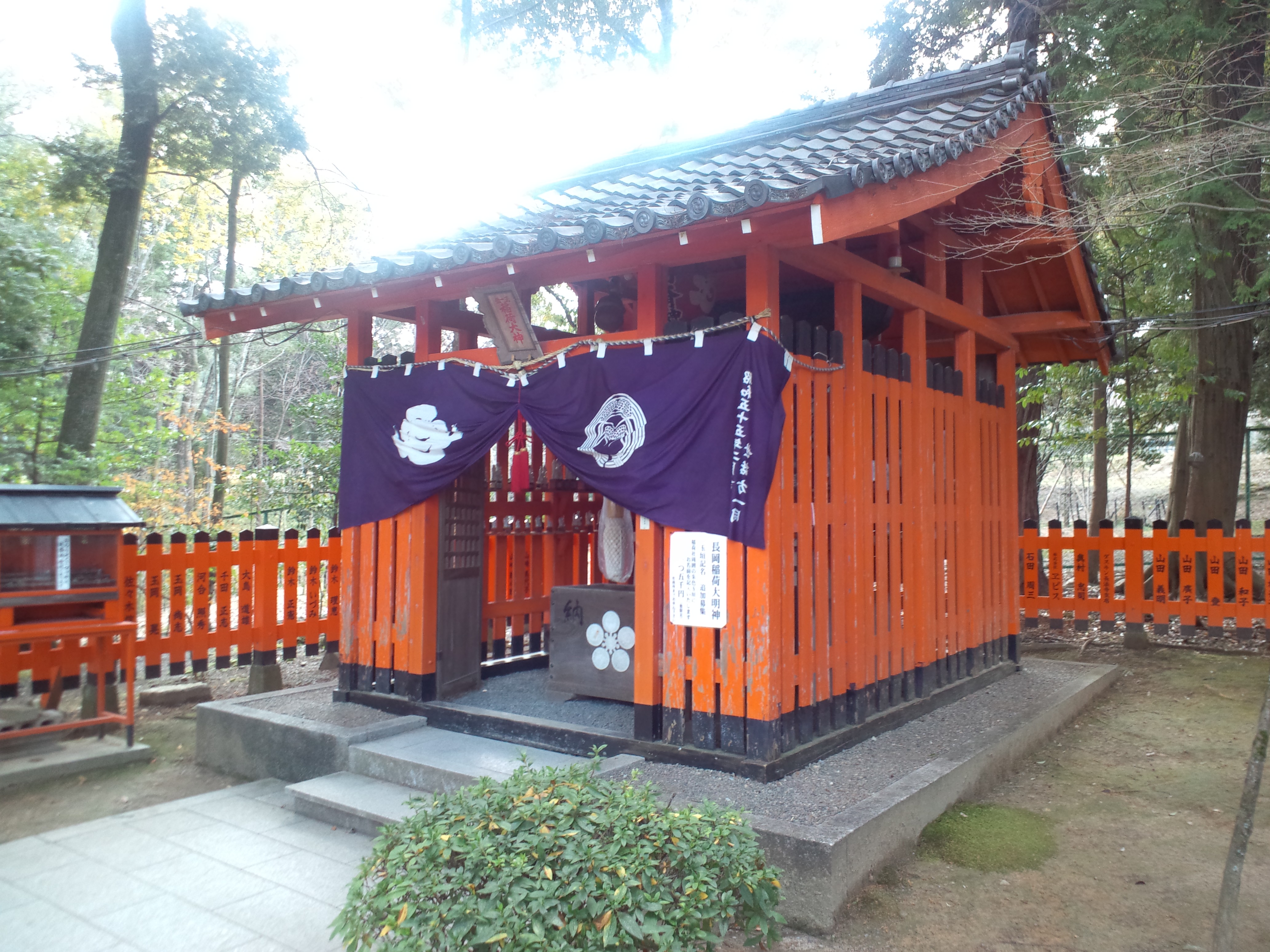 長岡天満宮 稲荷社